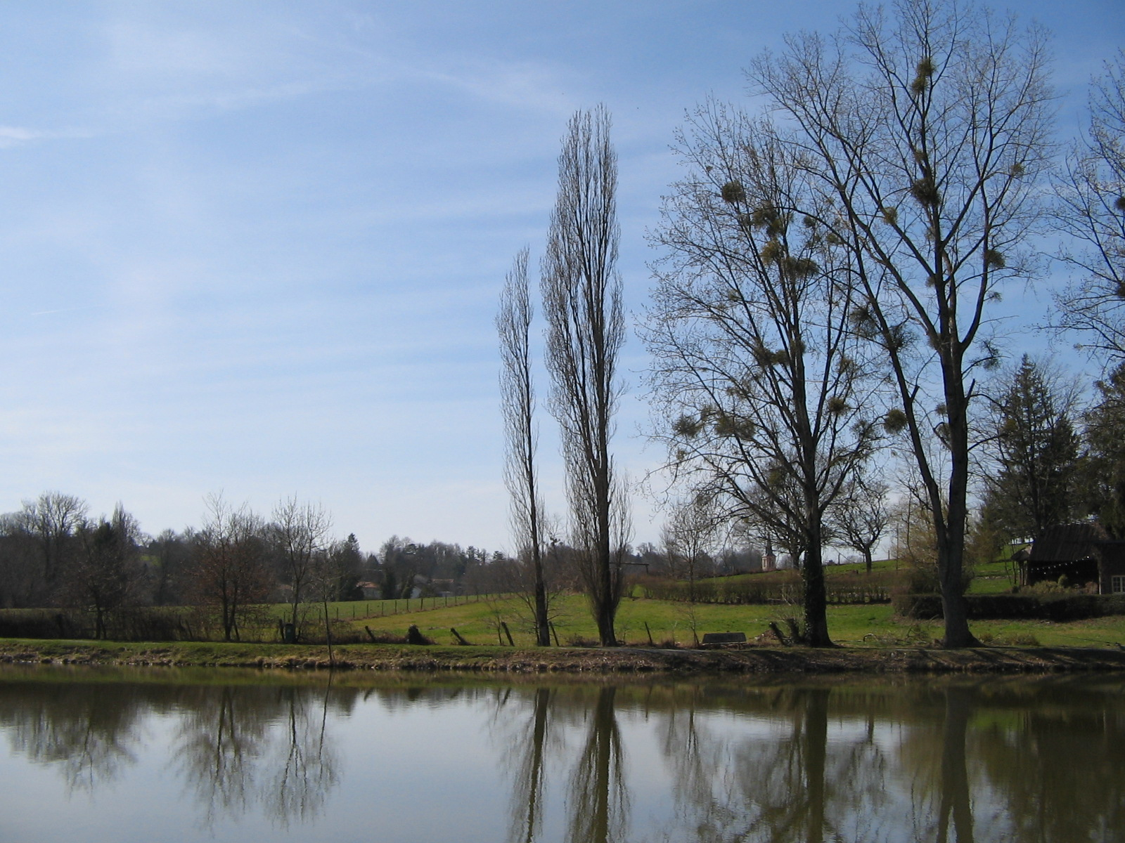 le plan d'eau à Verruyes (79) en mars 2010